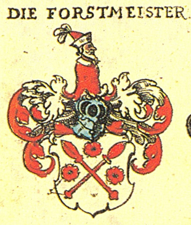 Ritterschaft und Adel in Franken Wappen der Familie der Forstmeister (Forstmeister von Lebenhan).